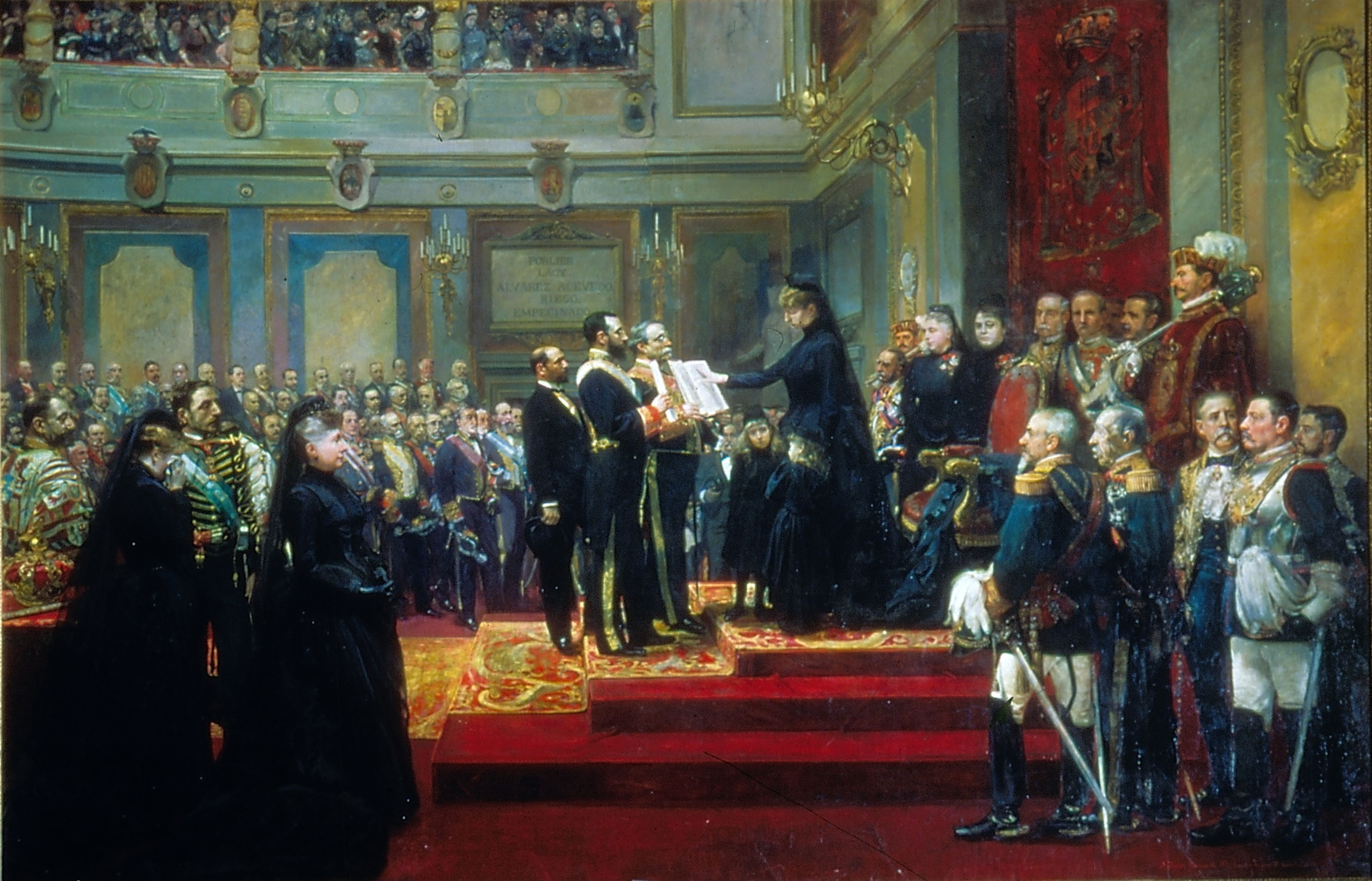 El lienzo representa el acto celebrado el día 30 de diciembre de 1885, a las dos de la tarde, en el que la reina Regente María Cristina de Habsburgo-Lorena juró ante las Cortes, tras la defunción de su esposo, el rey Alfonso XII, ser fiel al heredero del trono y guardar la Constitución de 1876. Junto a la reina aparecen sus dos hijas, las infantas María de las Mercedes y María Teresa y frente a la reina está el presidente del Gobierno, Antonio Cánovas del Castillo, con el libro abierto. A la izquierda del trono y situado casi de espaldas al espectador aparece el general Arsenio Martinez Campos.